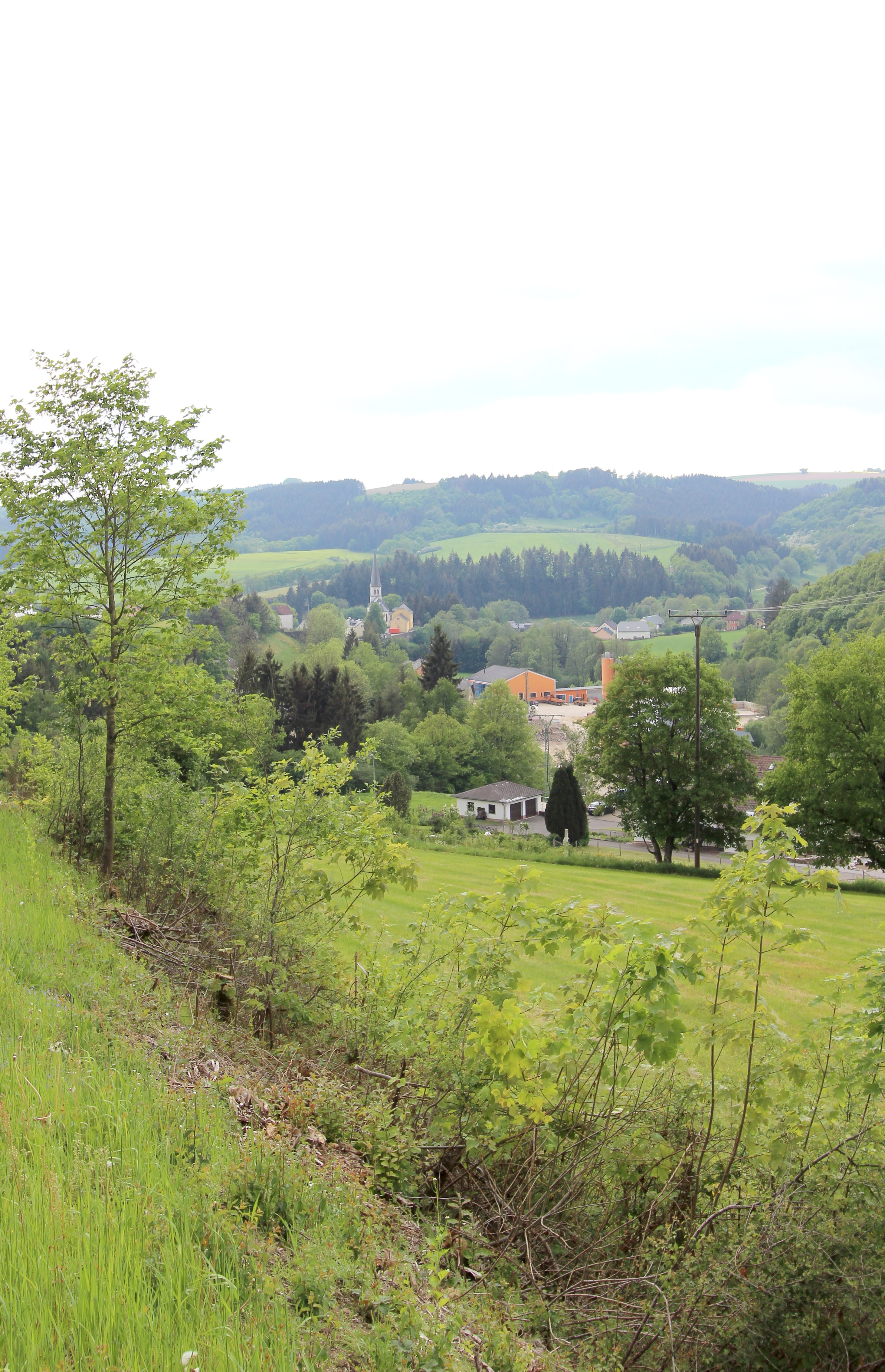 54689 Irrhausen, Hauptstraße. Rastplatz an der B 410. Aufnahme von 2018.